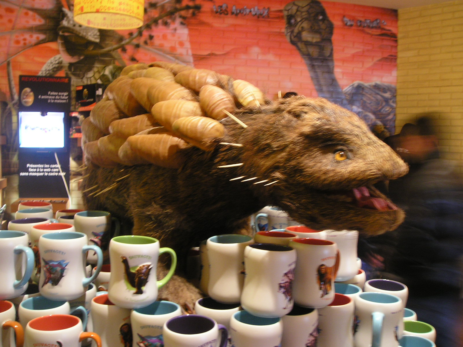 "Cuirasson", animal issu de l'attraction Les Animaux du Futur du Futuroscope